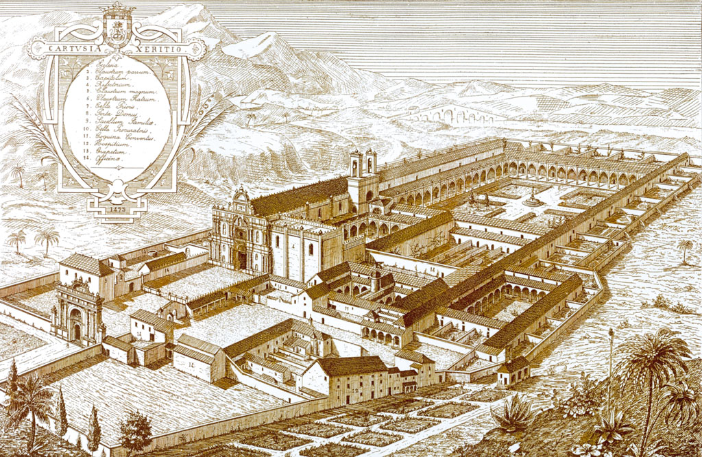 Chartreuse de Xérès en Espagne. Gravure XVIIIe siècle.